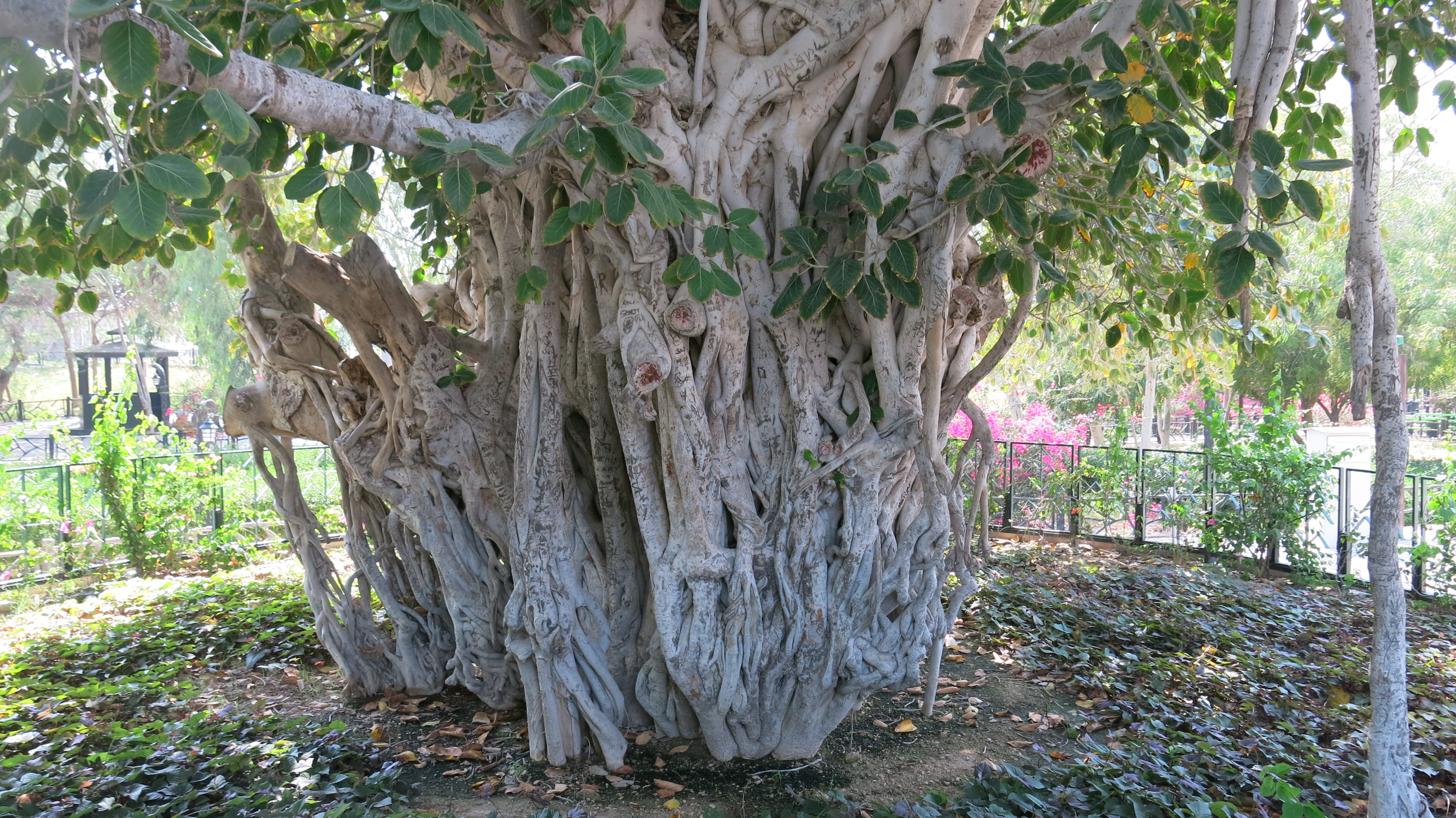 درخت انجیر معابد کیش عکس مربوط به تاریخ 13960128